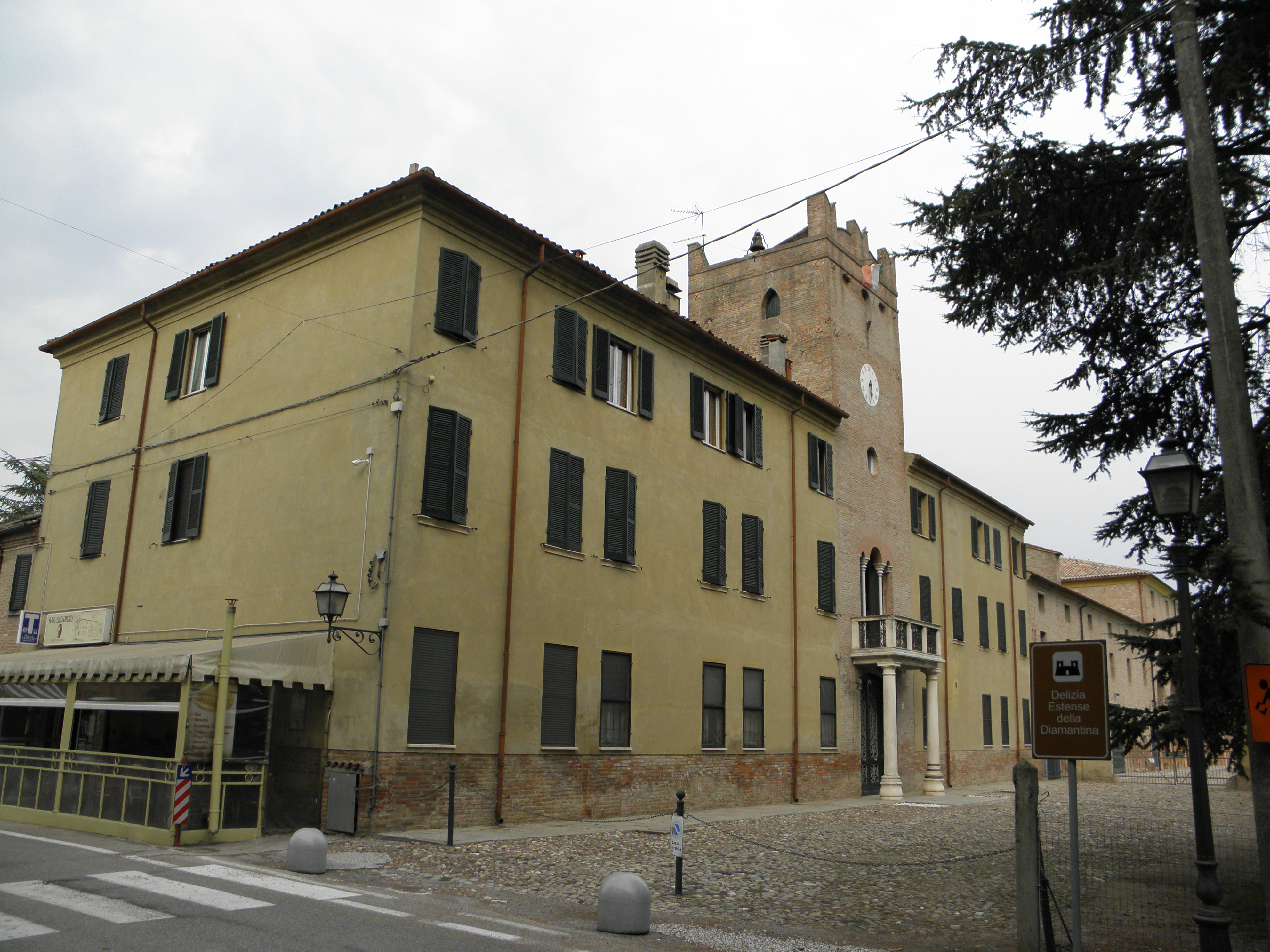 Diamantina, frazione di Vigarano Mainarda: la Delizia della Diamantina.